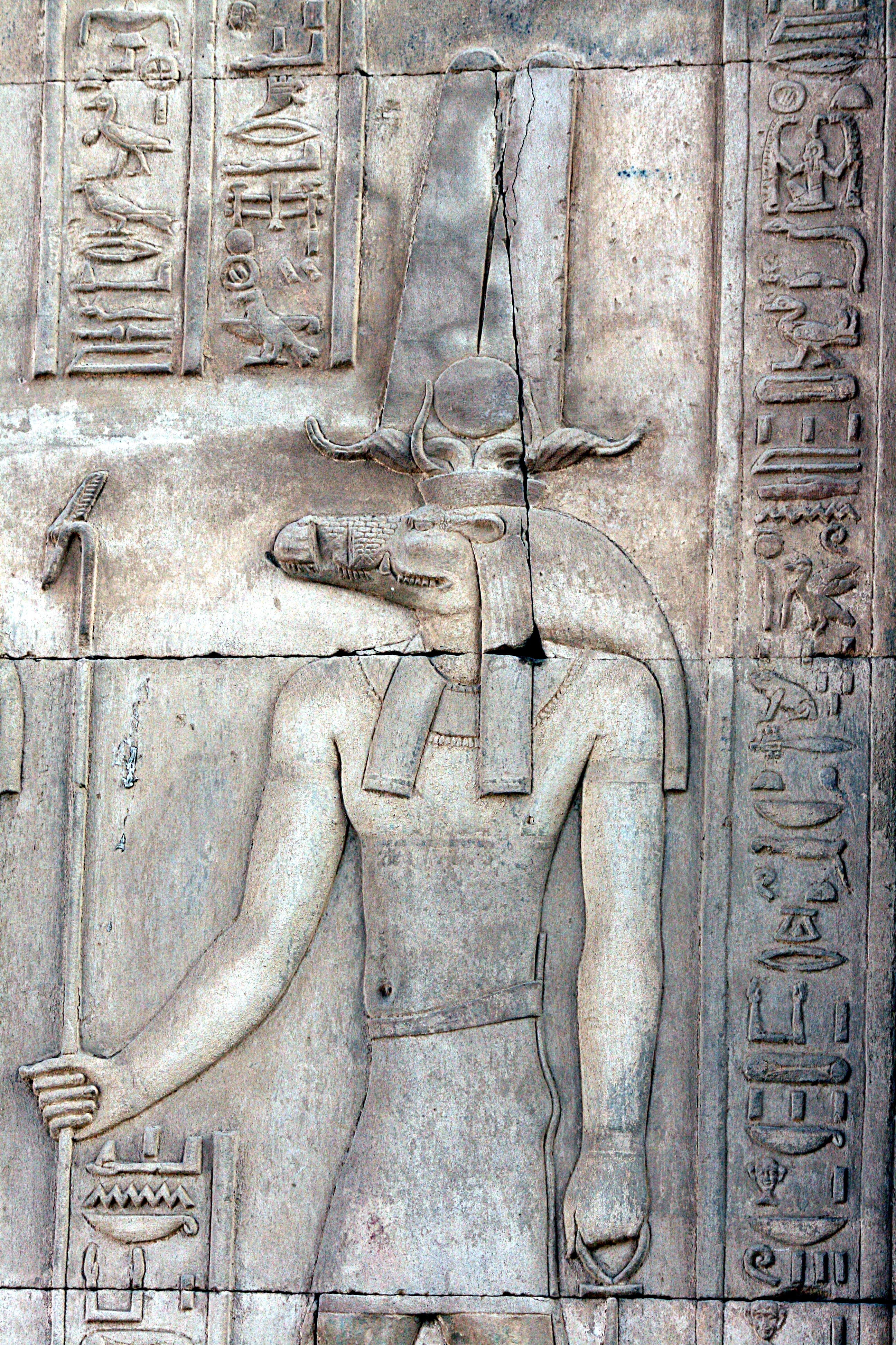 Tempel von Kom Ombo: Relief des Krokodilgottes Sobek